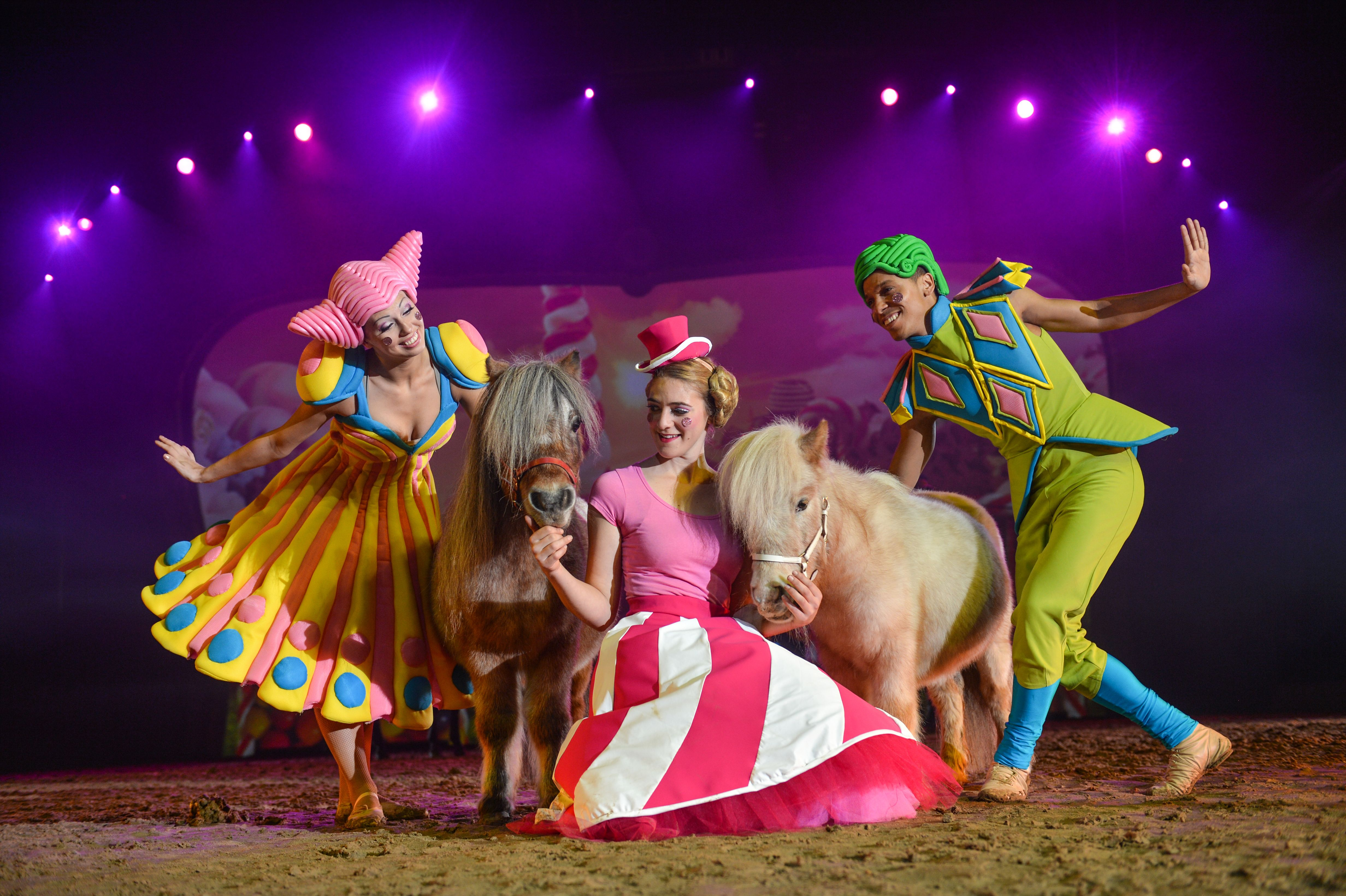 Candyland-Szene mit den „Flying Shettys“